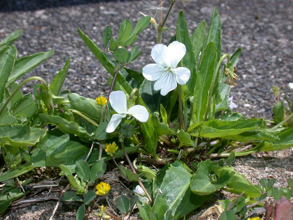 Viola betonicifolia var. albescens アリアケスミレ 2008.04.20 和歌山県那智勝浦町